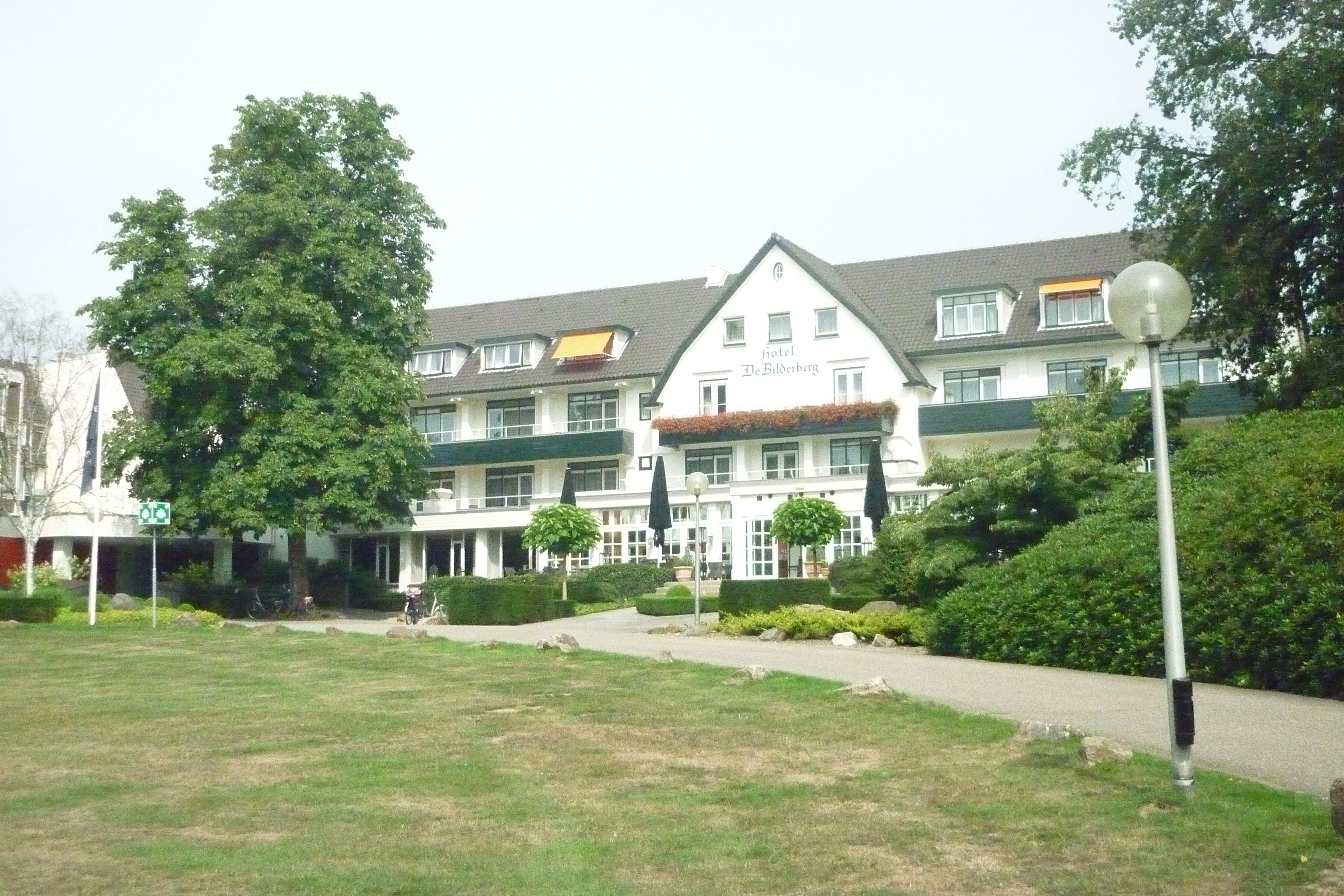 De Bilderberg, hotel